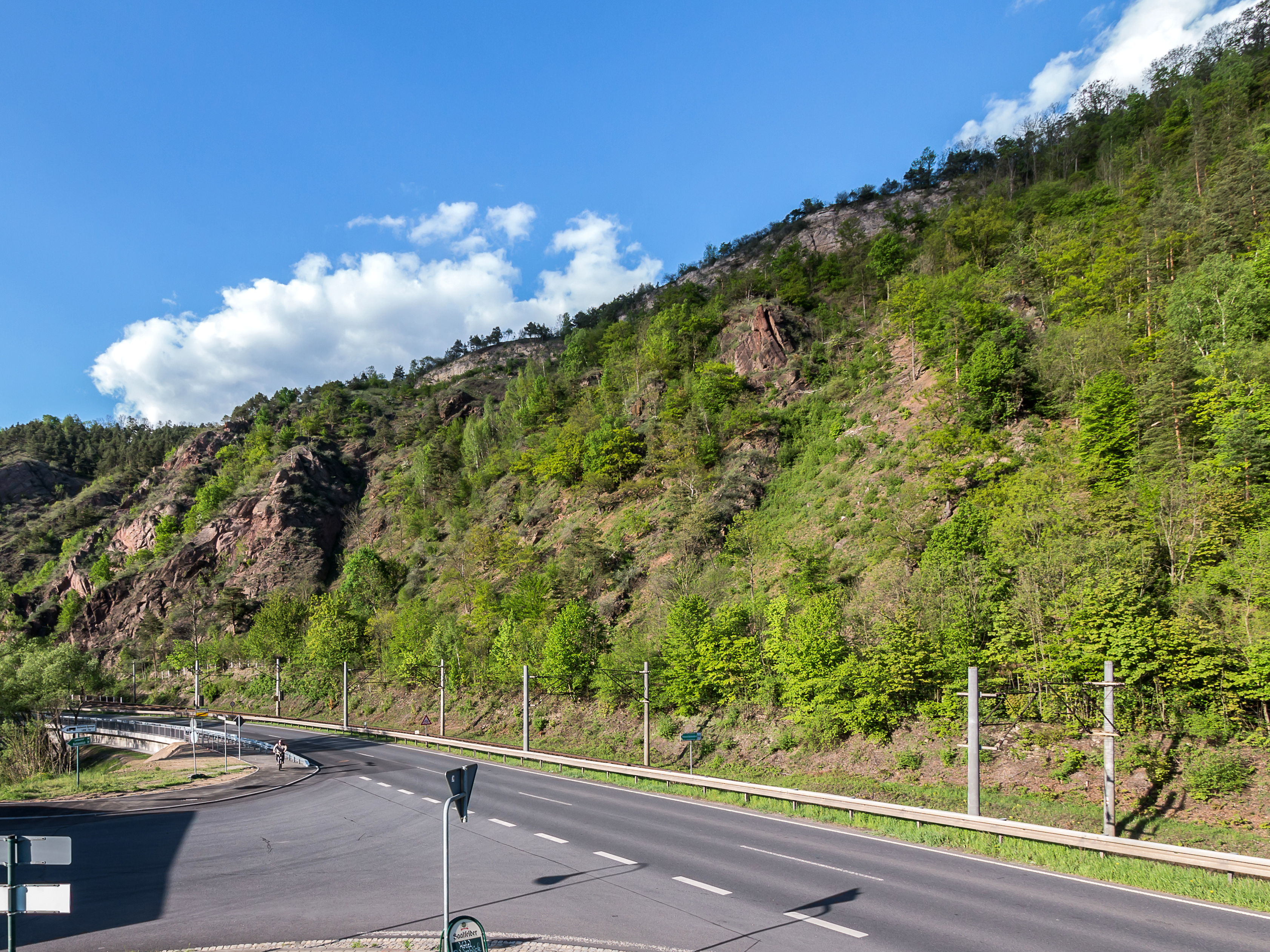 Naturschutzgebiet Nr. 160 Bohlen WDPA ID 162484 Sublocation DE-TH , Bohlenwand